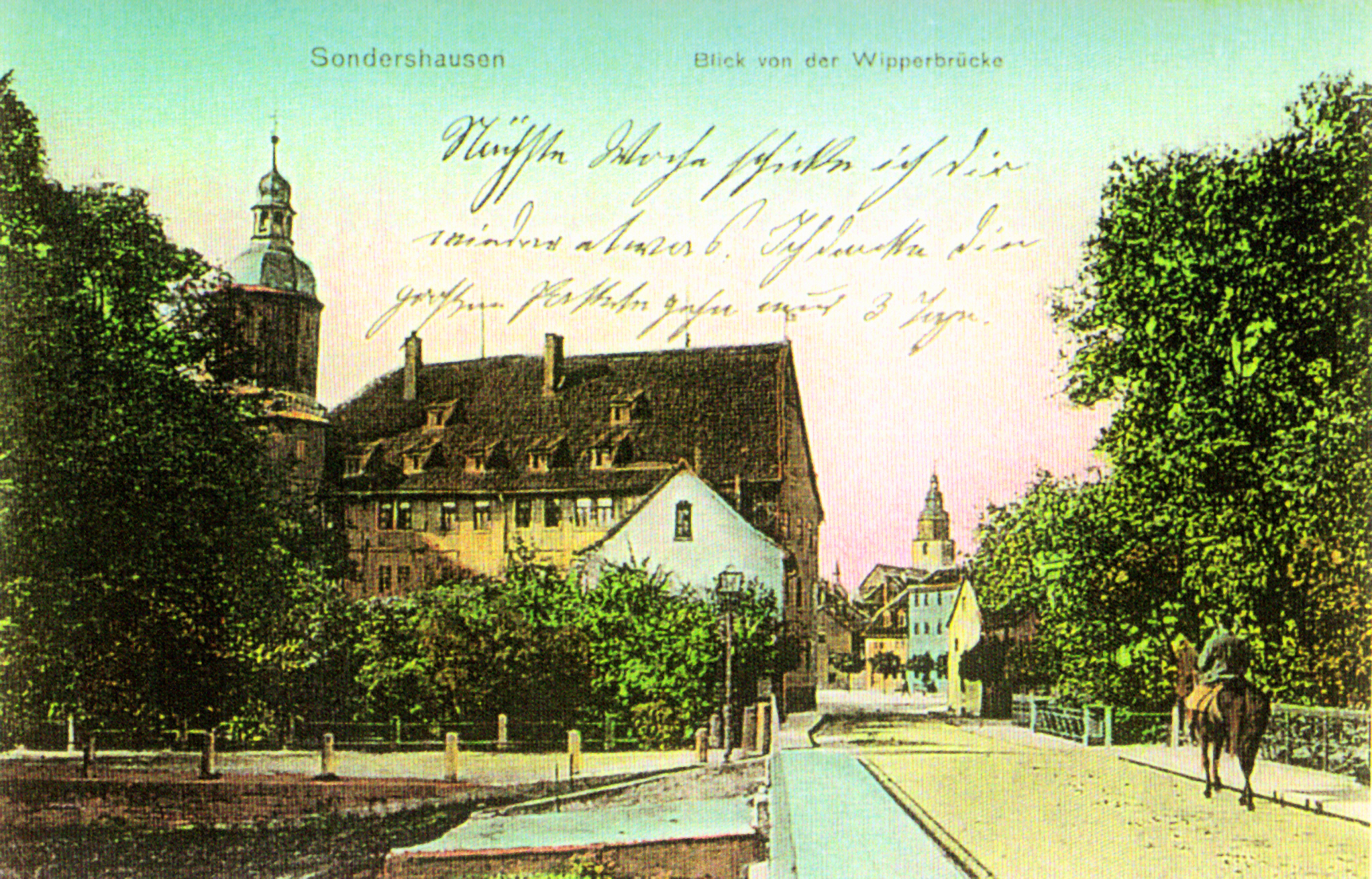 Turm der Cruciskirche Sondershausen mit Nebengebäude, dem Hospiz und Planplatz